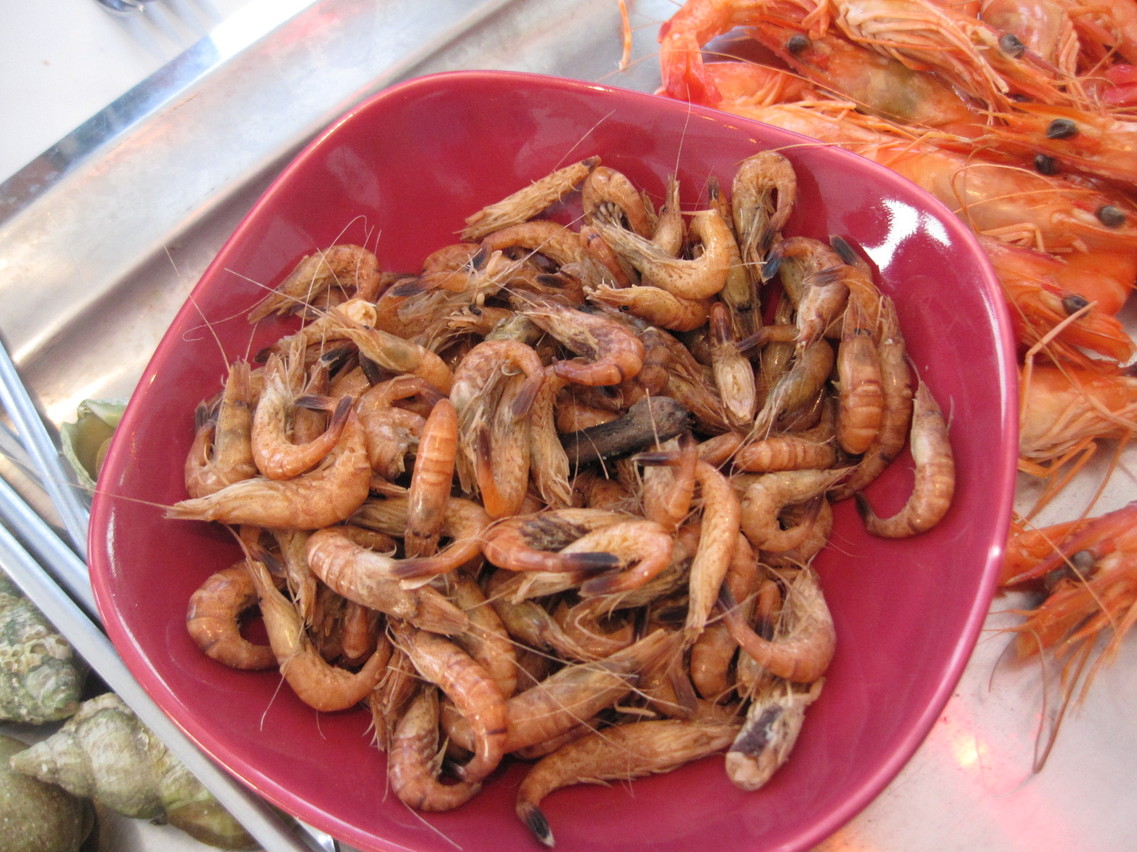 Crevette grise en appétitif